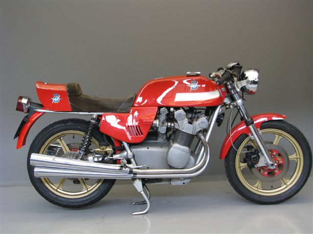 MV Agusta 750 S America motorcycle from 1977